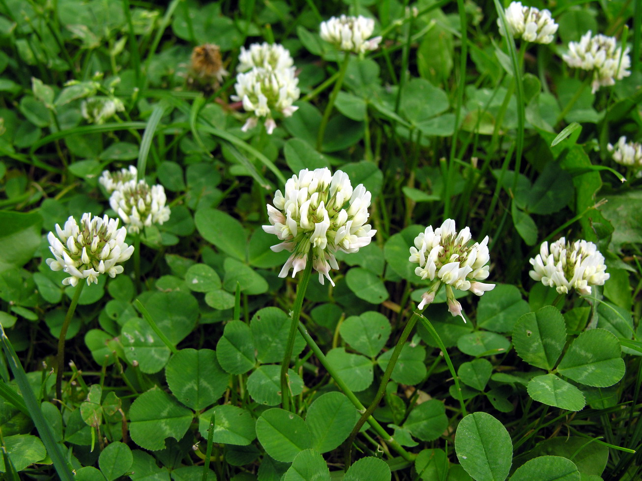 Baltasis dobilas (Trifolium repens), žiedas Šeima. Pupiniai (Fabaceae) Foto: Algirdas, 2006 m. birželio 24 d.